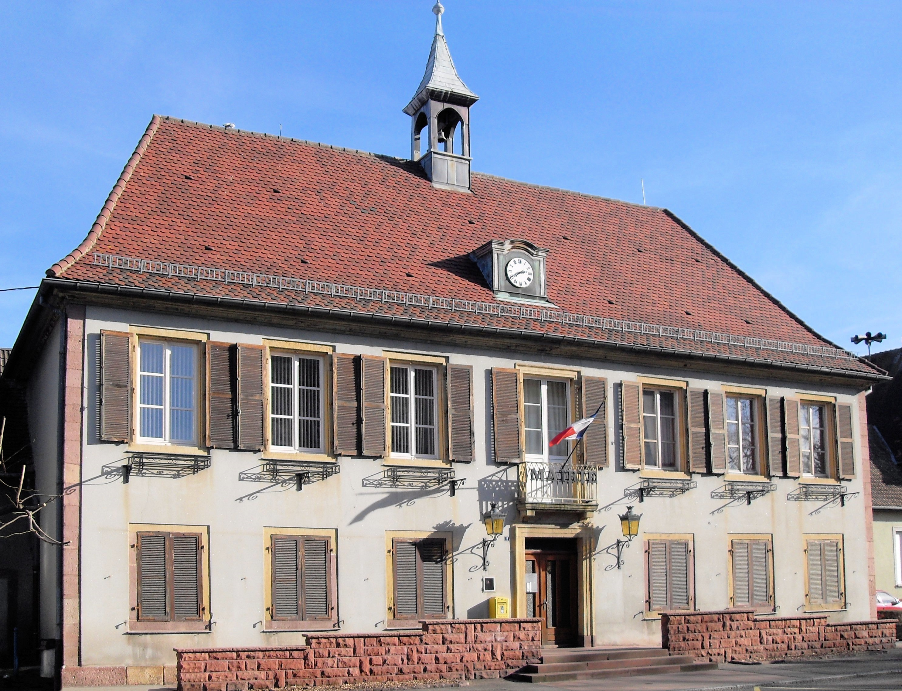 La mairie d'Issenheim